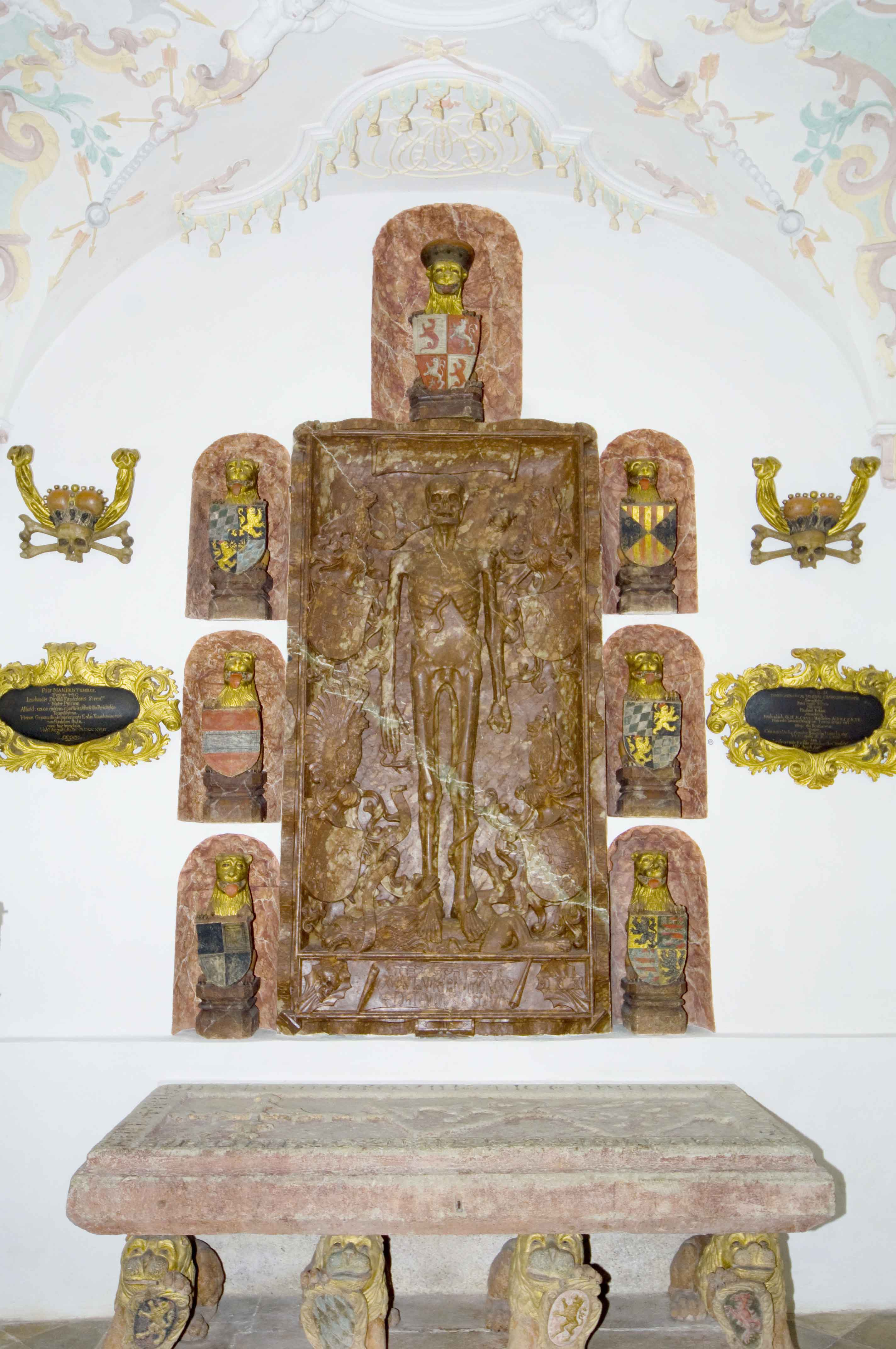 Kloster Reichenbach am Regen Nebenaltar